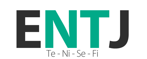 Logo ENTJ MBTI.